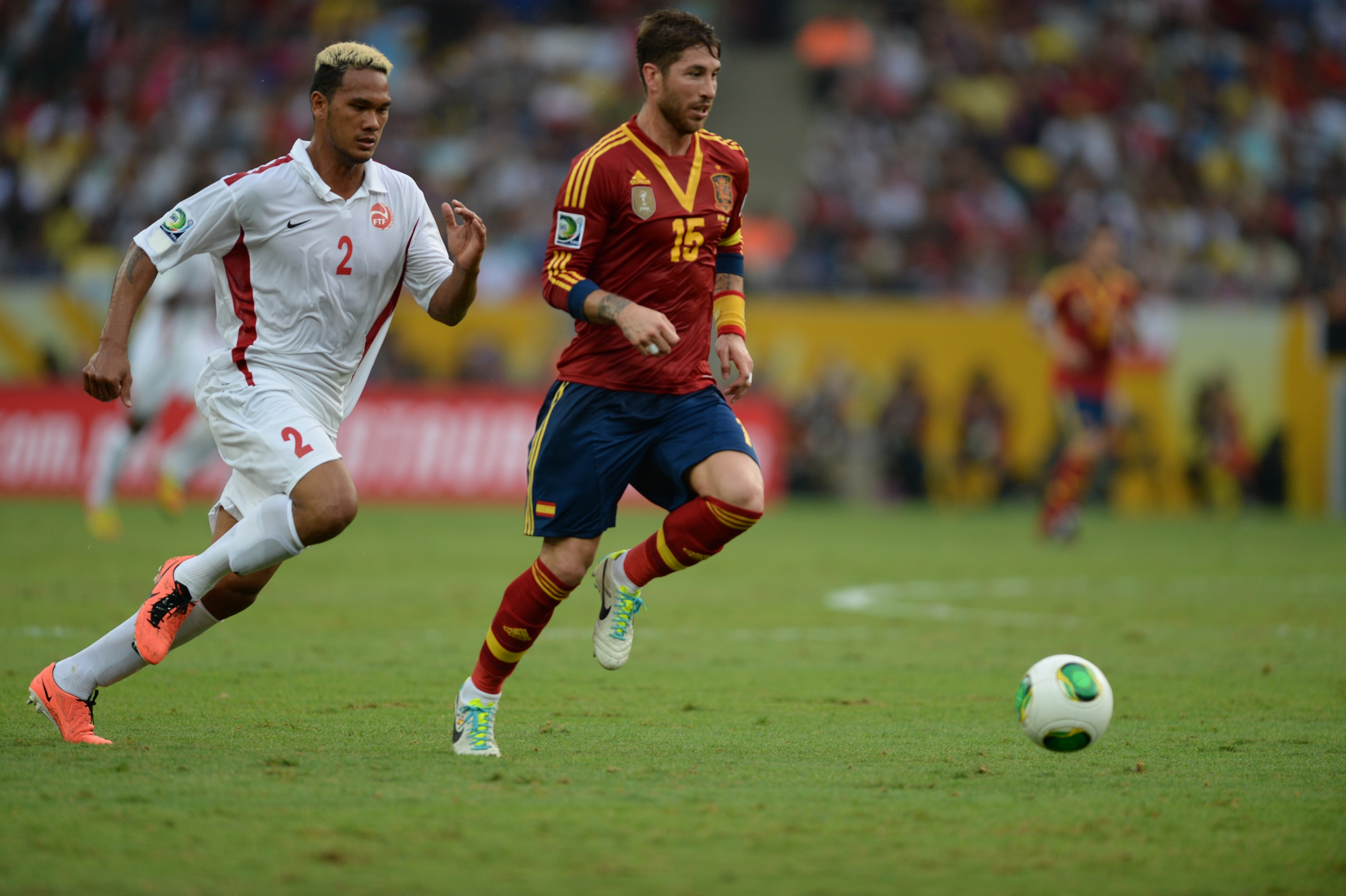 Espanha e Taiti se enfrentam na Copa das Confederações 2013